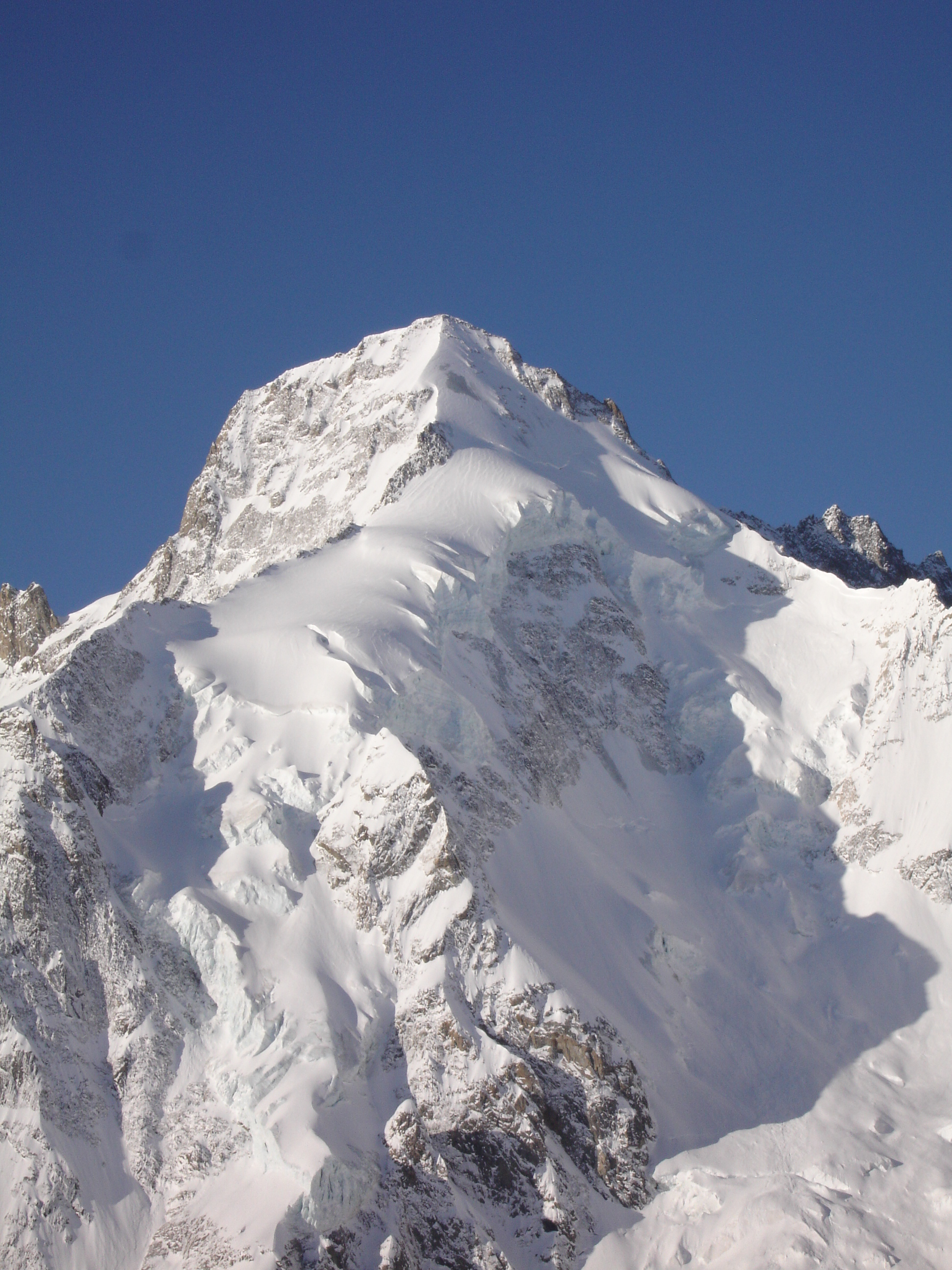 Face NNE du Dolent (3820m), vue de la Grande Lui